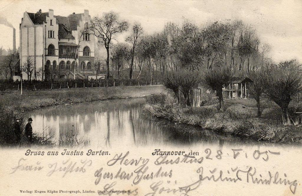 Die von dem Lindener Fotografen und Verleger Eugen Kipke vor 1905 aufgenommene Ansicht des Gebäudes von Justus Garten an der Hafenstraße in Hannover, nahe dem Zusammenfluss von Leine und Ihme. Im Vordergrund die Leine, die hier damals in einem Bogen das Flurstück Stapel umfloss. Die im Bild nicht sichtbare Ihme floss hinter dem Haus, aber vor den im Hintergrund sichtbaren Industriegebäuden in Linden. Der Standort des Fotografen entspricht etwa der heutigen Kreuzung Wilhelmshavener Straße/Kapitän-von-Müller-Straße, von dieser Stelle ist die Leine heute ca. 200 Meter entfernt.